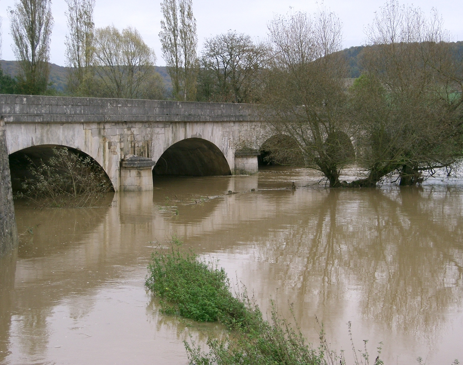 Domrémy - la Meuse grossie par les pluies d'automne self made PRA